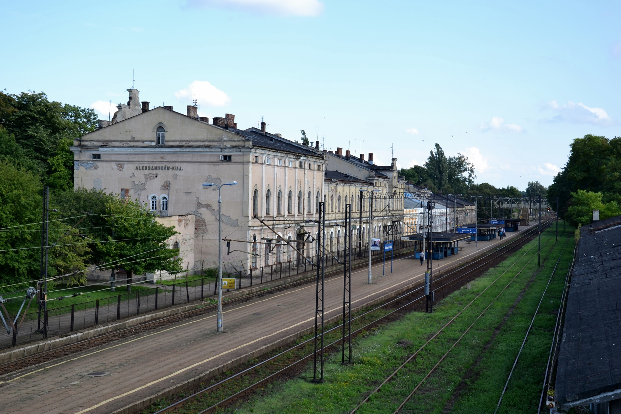 Aleksandrów Kujawski dworzec widok z kładki przy przejeździe kolejowym, 13.08.13r.